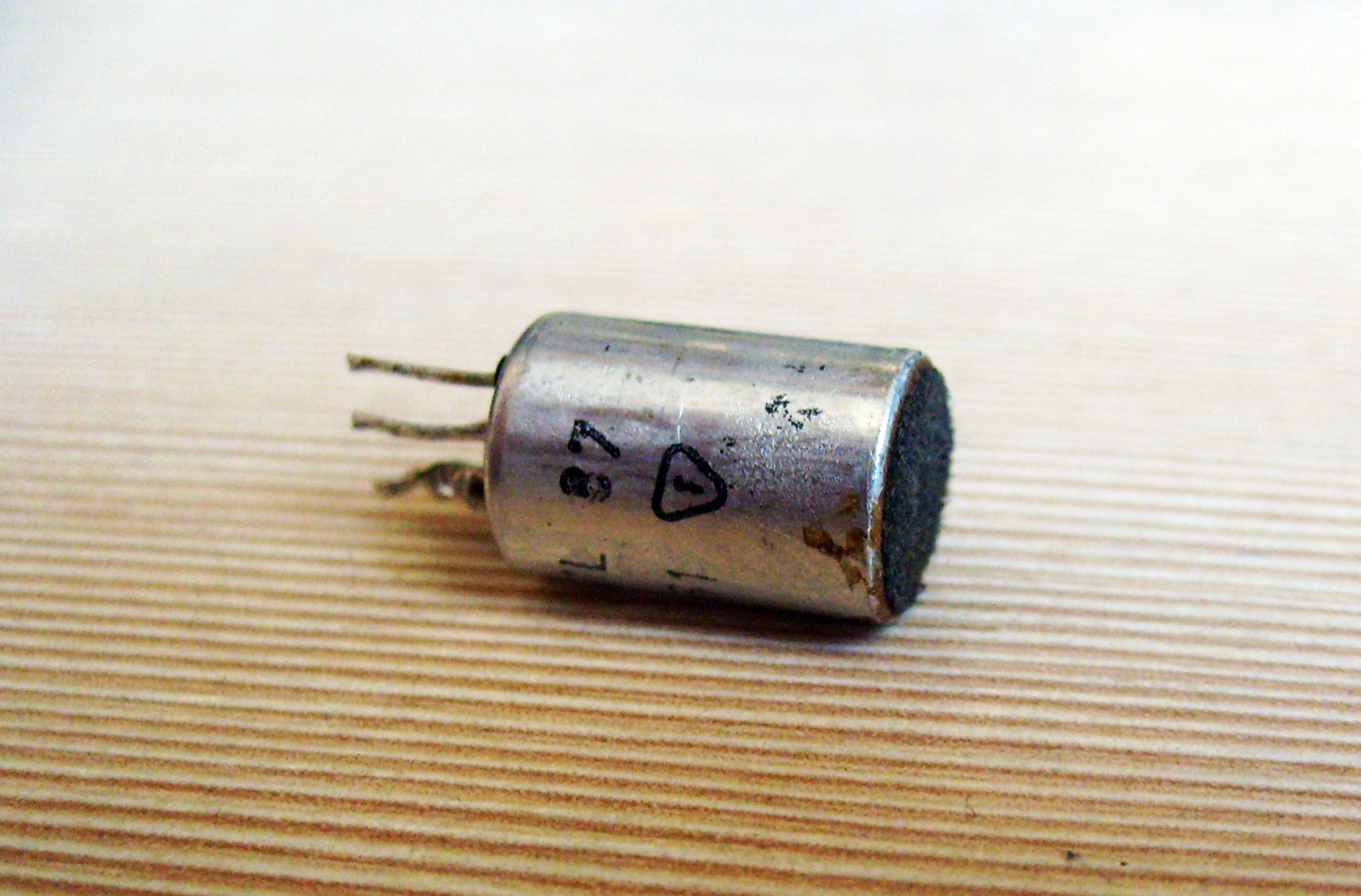 Mikrofon elektretowy produkcji polskiej - Me061 (pin 1 (obudowa) - minus; pin 2 (środkowy) - out; pin 3 - zasilanie); R (p2-p1) = 2,7k